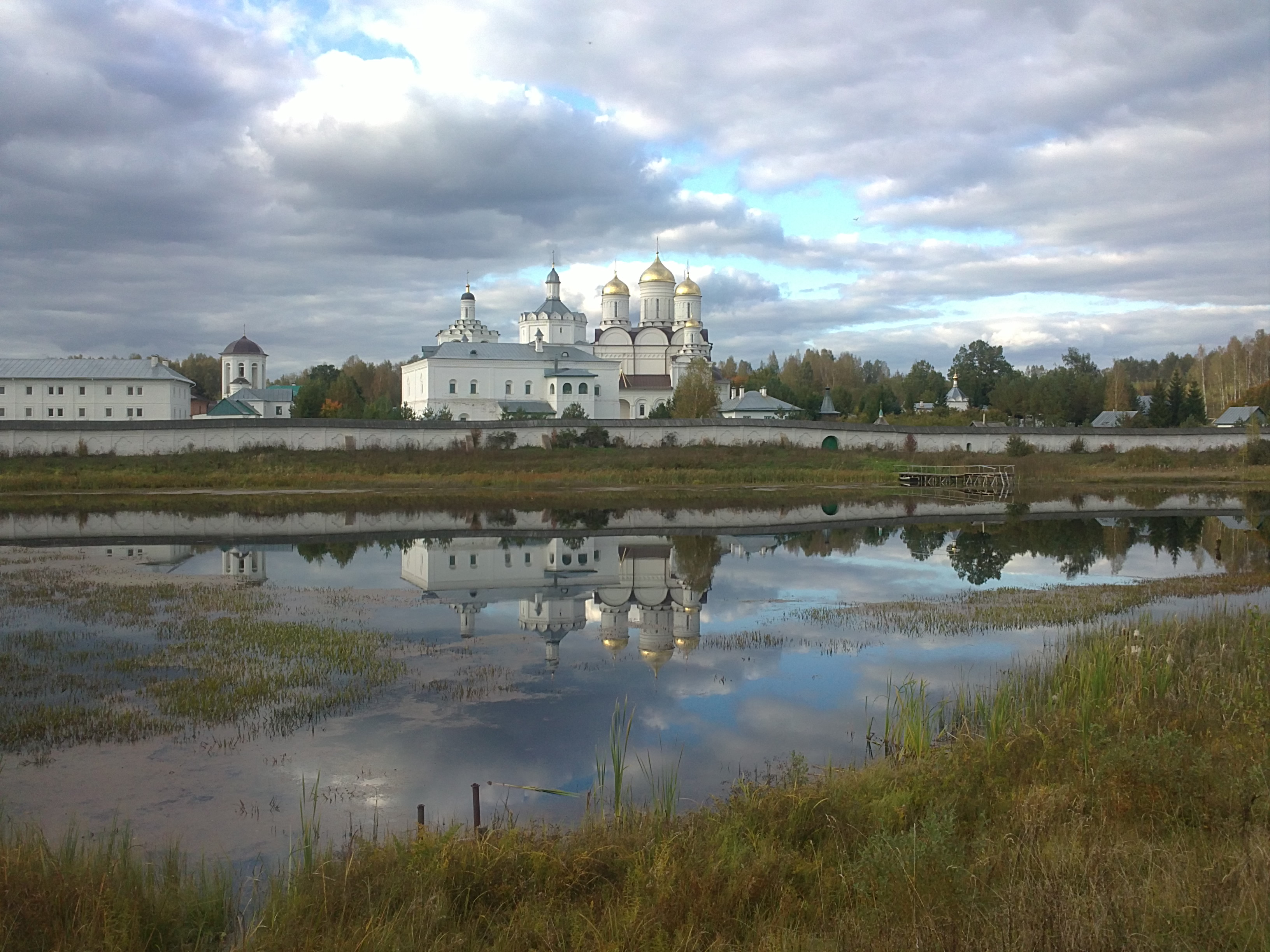 Монастырь Троицкий (руины Болдинского монастыря) (Смоленская область, Дорогобуж, село Болдино)